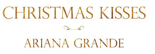 Logotipo de "Christmas Kisses".